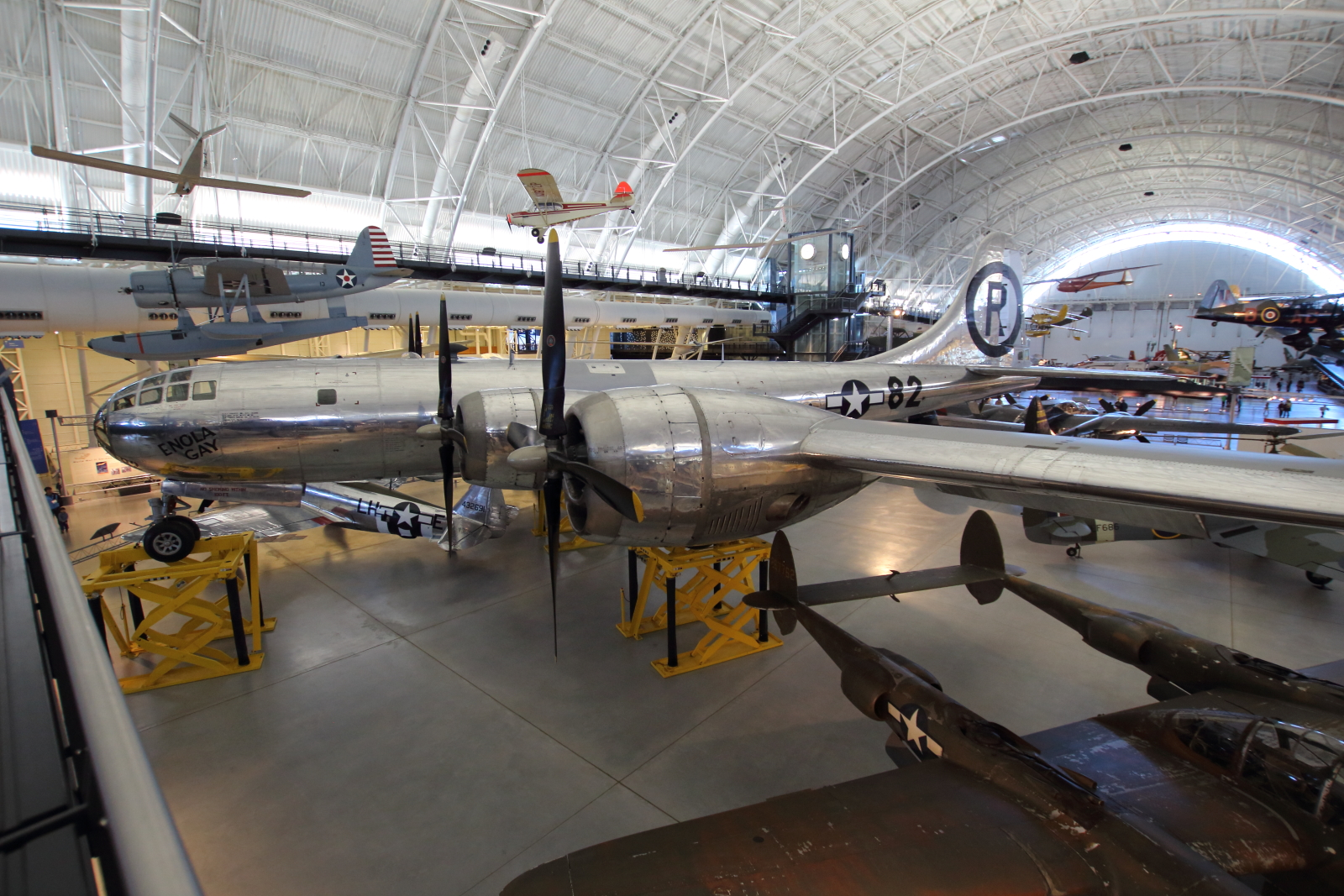 Boeing B-29 Enola Gay